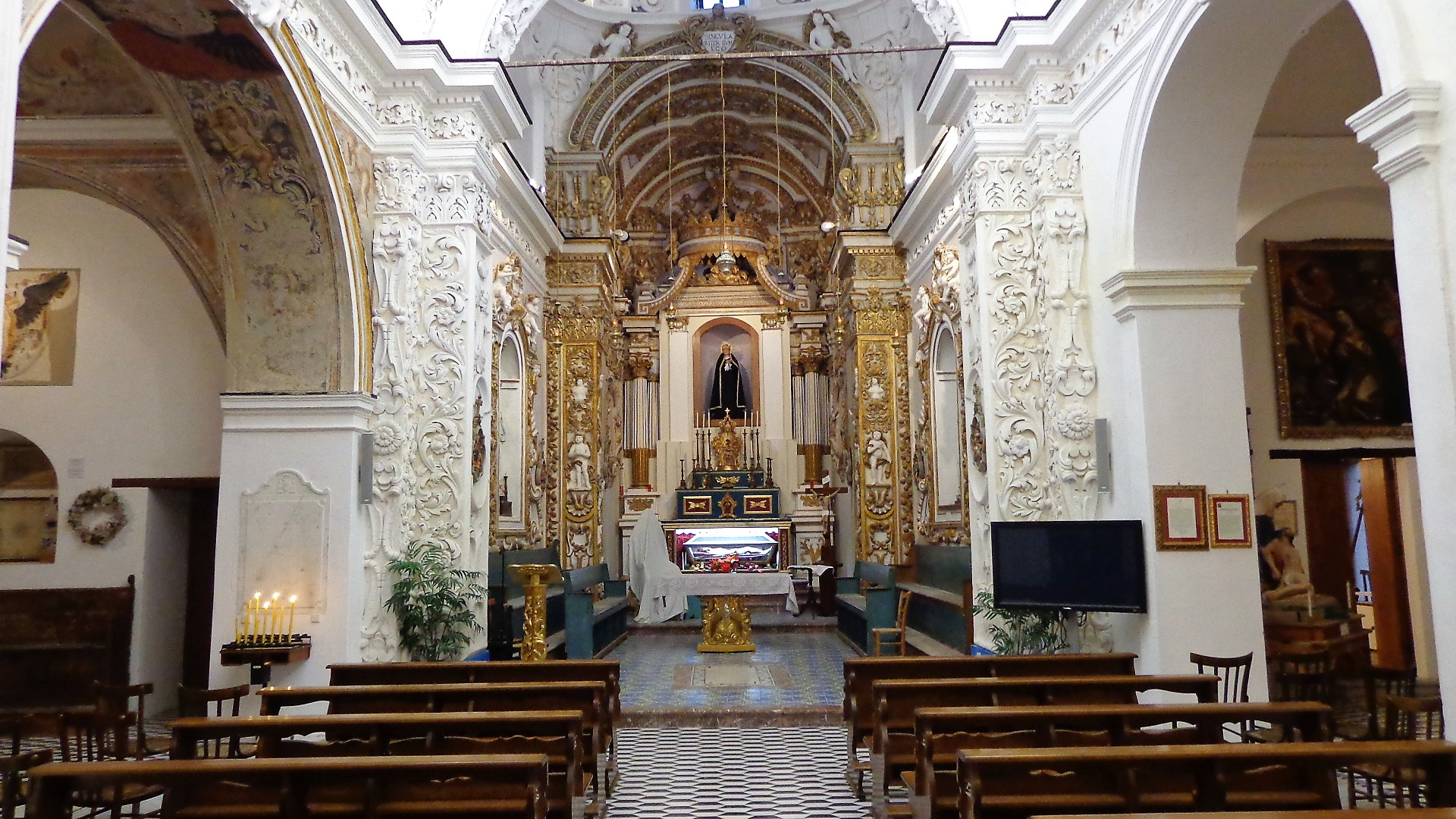 Aula.